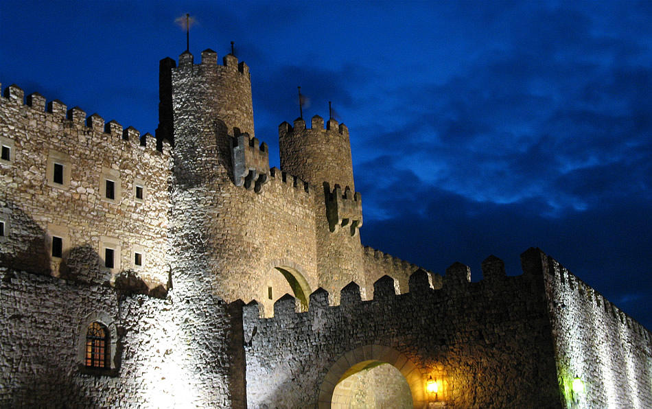 Castillo de Sigüenza, actual Parador. Sigüenza (Guadalajara, España)